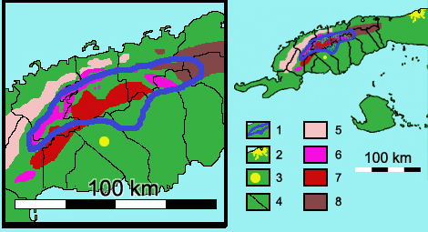 Mapa de distribución de Microcycas calocoma, versión apaisada. Con cuadros de leyenda que corresponden a: Área de distribución de Microcycas calocoma (1), Ciudad de La Habana (2), ciudad de Pinar del Río (3), límites municipales de la provincia Pinar del Río (4), Alturas Pizarrosas del Norte (5), Sierra de Los Órganos (6), Alturas Pizarrosas del Sur (7), Sierra del Rosario (8). Fuentes consultadas : Risco et al. (1984) y Peña et al. (1998), que aparecen en artículo de wikipedia en español Microcycas calocoma [1].